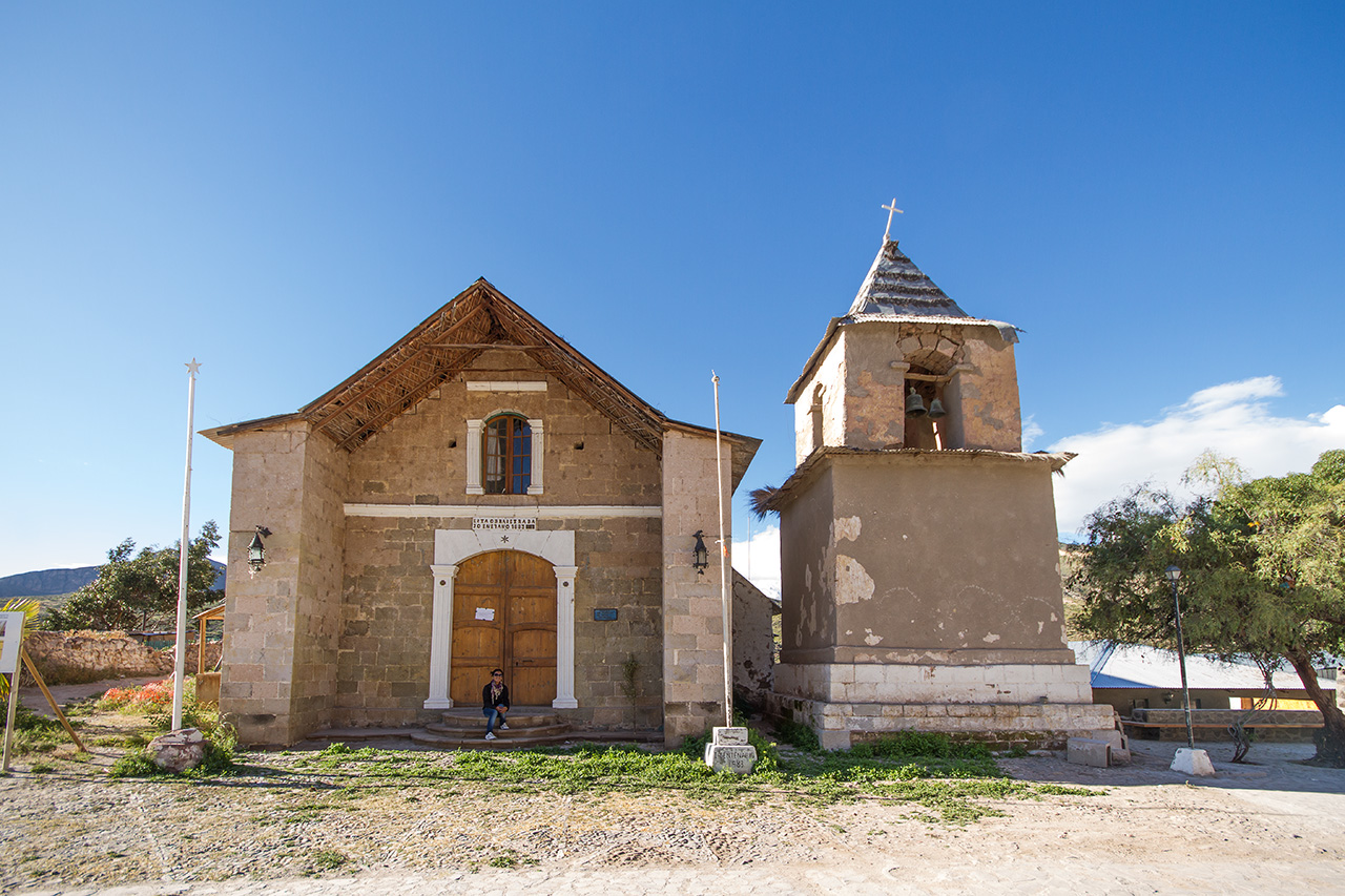 Iglesia San Francisco de Asís de Socoroma This is a photo of a national monument in Chile: 951